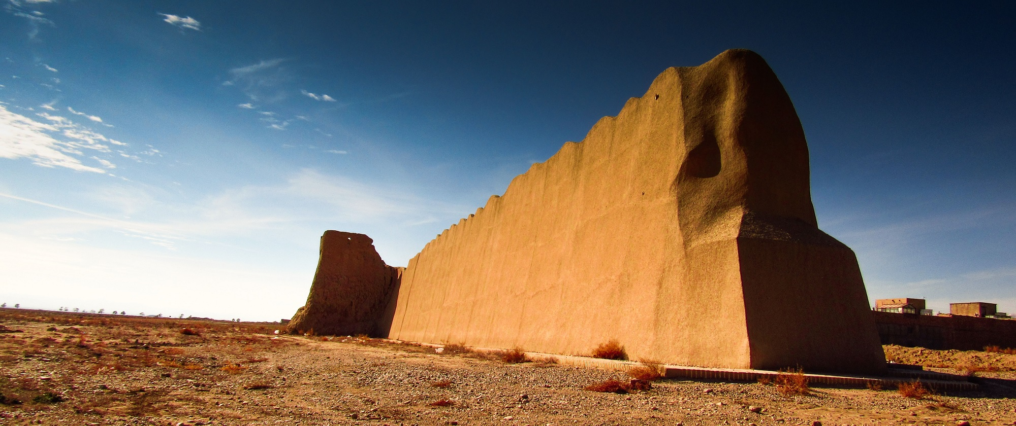 دیوار باروی دامغان دیواری به طول ۱۶کیلومتر که در حال حاضر تنها ۸کیلومتر از آن به جای مانده است ، دیواری به قدمت مسجد تاریخانه دامغان و یا حتی فراتر از آن است و برخی قدمتش را به دوران پیش از اسلام نسبت می دهند.